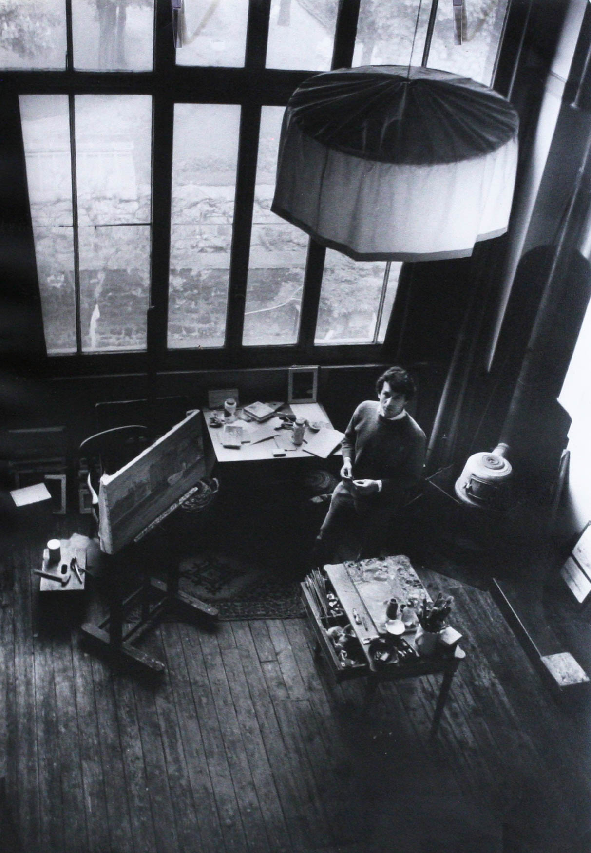 portrait